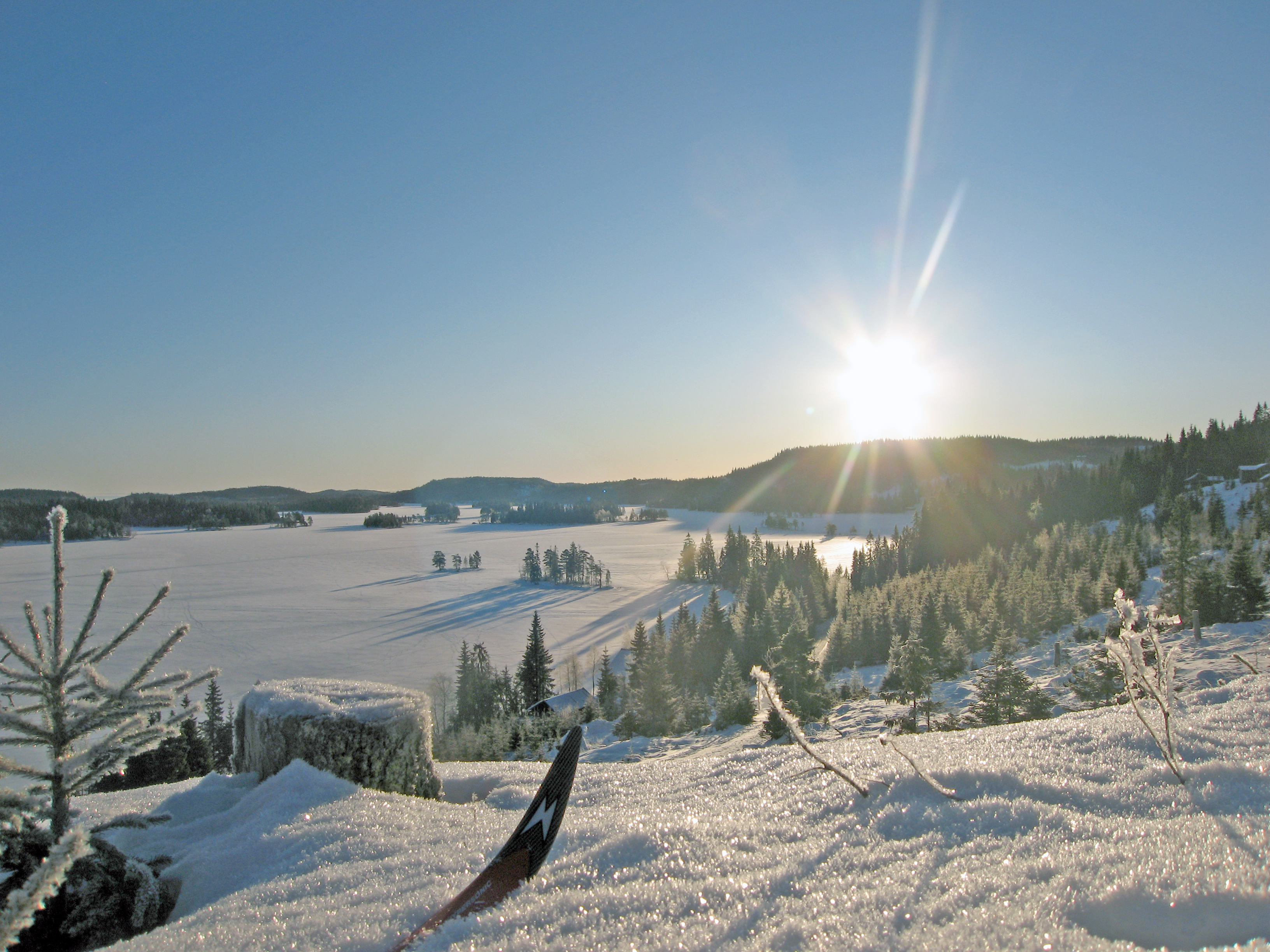 Winter scenery at lake Øyangen, Krokskogen, Oslomarka